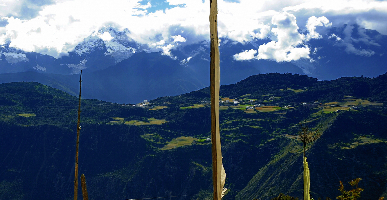 Mt Kawa Karpo (Meili).jpg